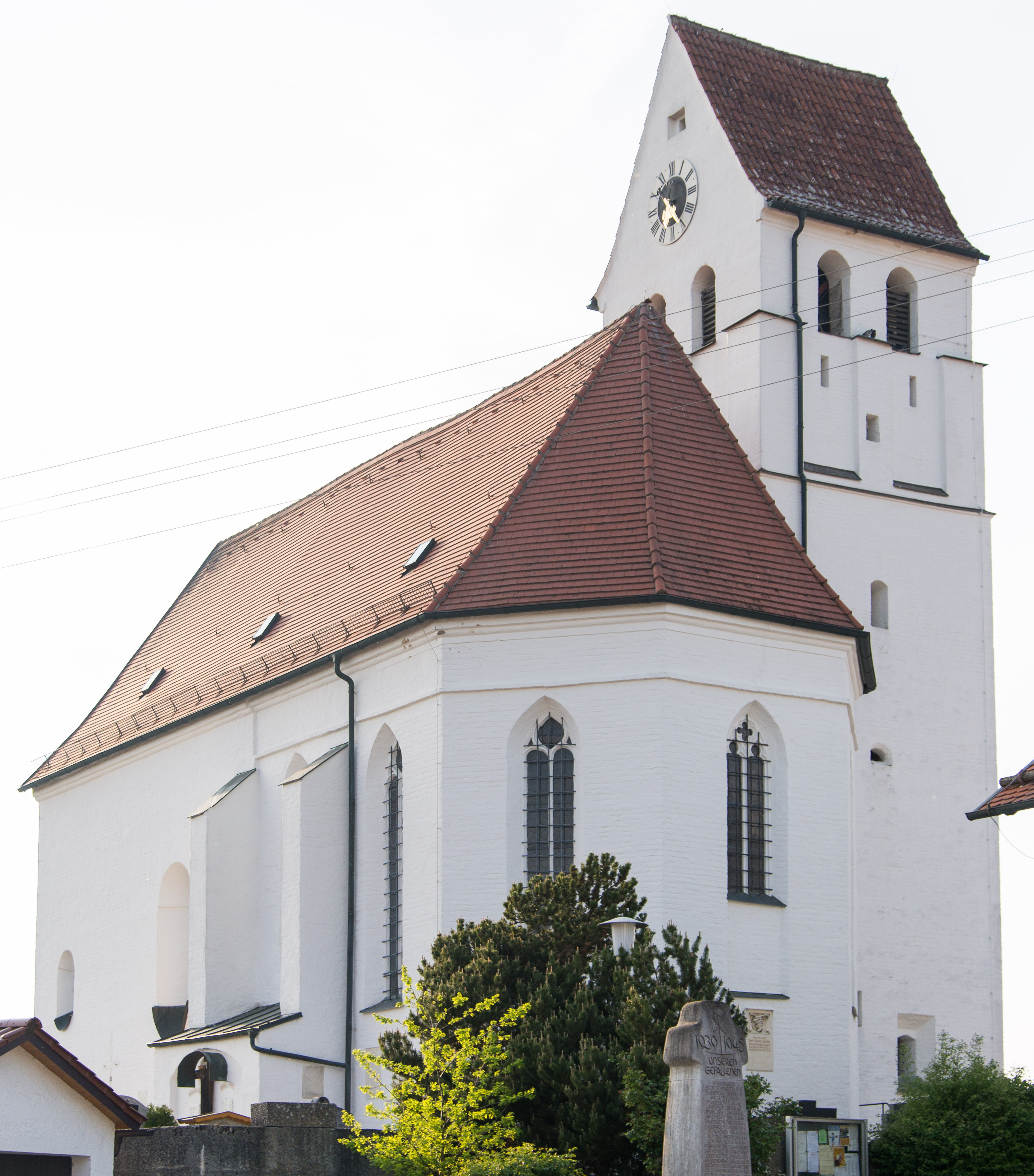 Pfarrkirche St. Michael: Saalkirche mit Chorflankenturm, Turm mit Satteldachabschluss, Chor und Turm spätgotisch, Langhaus barock; mit Ausstattung. This is a photograph of an architectural monument.